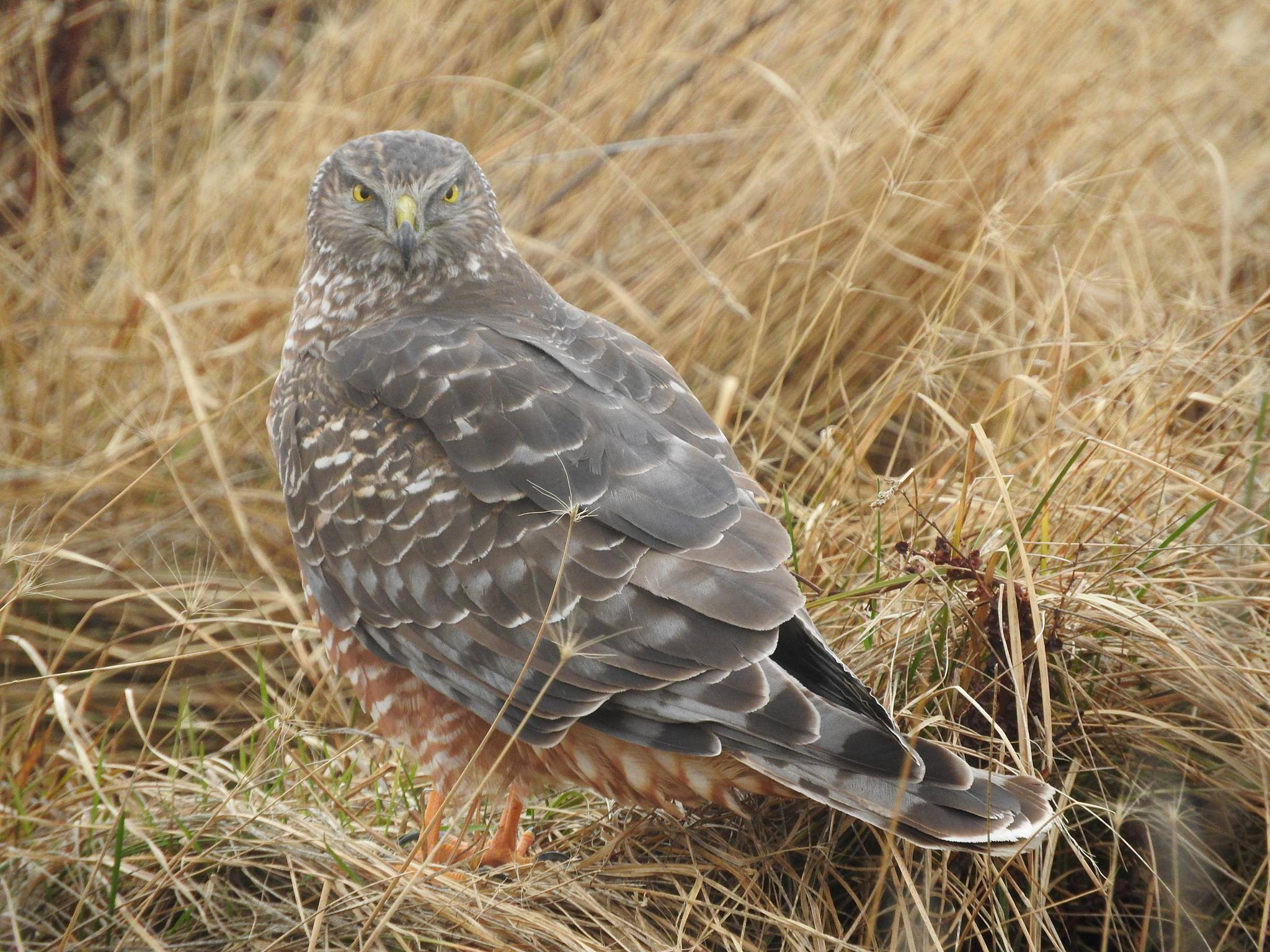 Gavilán Ceniciento en Laguna Nímez. El Calafate provincia de Santa Cruz, Patagonia, Argentina.